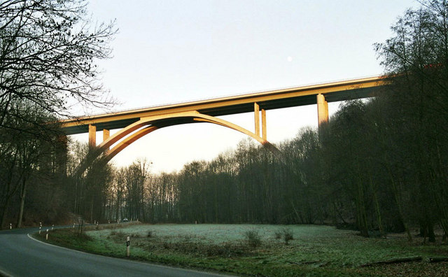 Das Bild zeigt die Seidewitztalbrücke der Autobahn 17 Dresden - Prag.